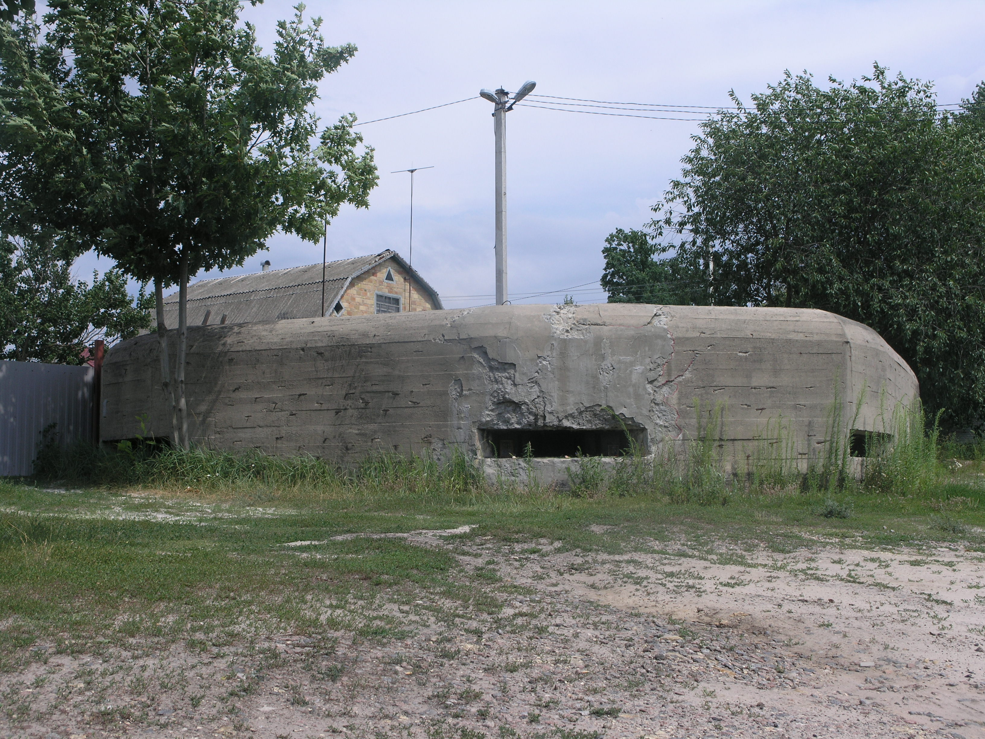 ДОТ 180